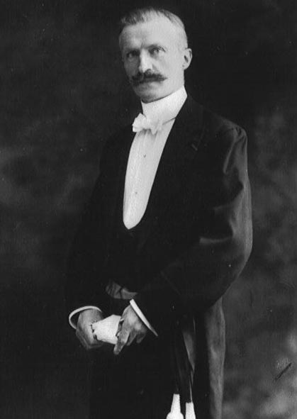 Burgemeester Charles Rotsart de Hertaing (1867-1925) - burgemeester van Maldegem (1904-1925) - Oost-Vlaanderen - Vlaanderen - België